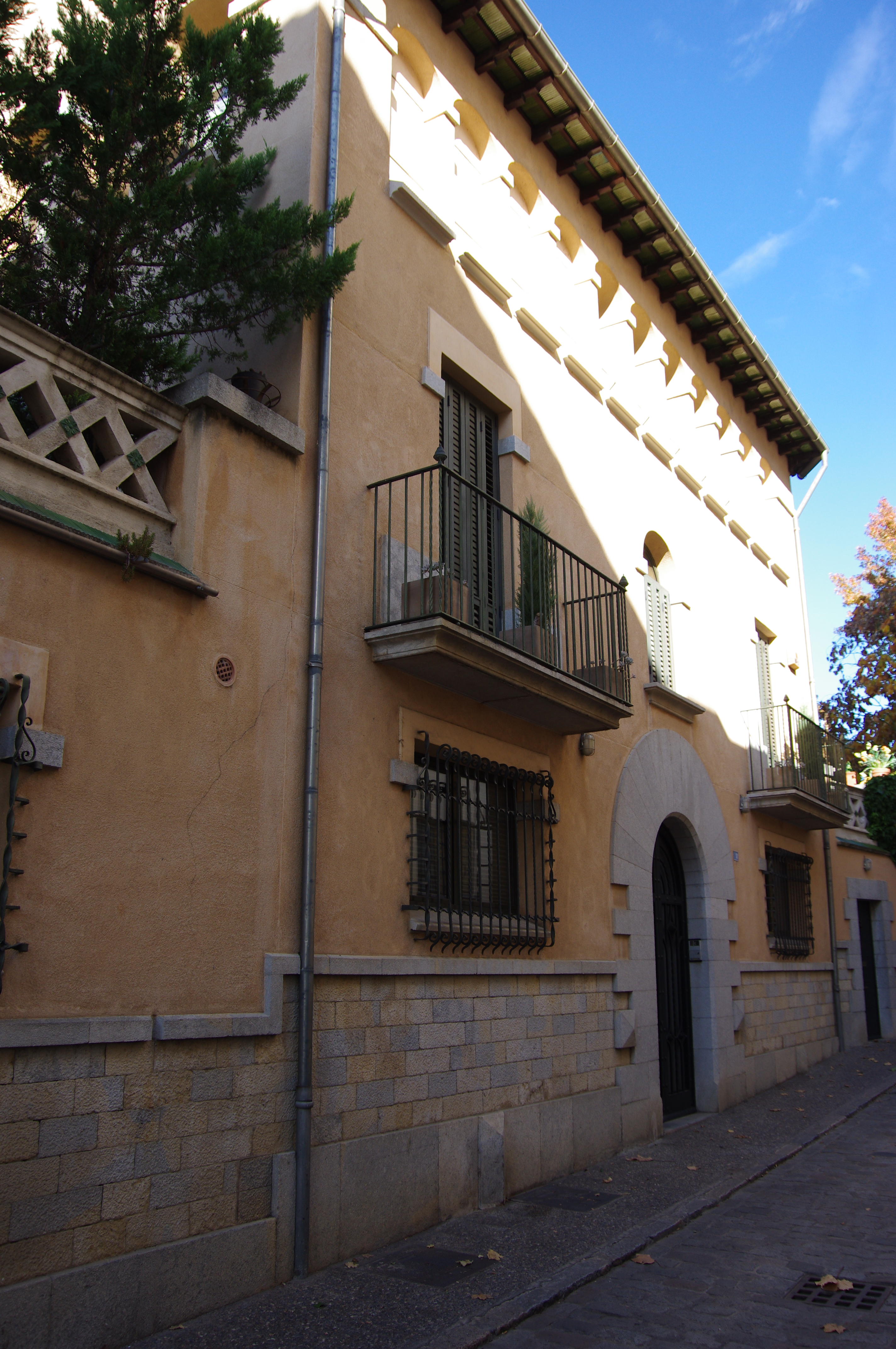 Casa Dalmau (Girona)